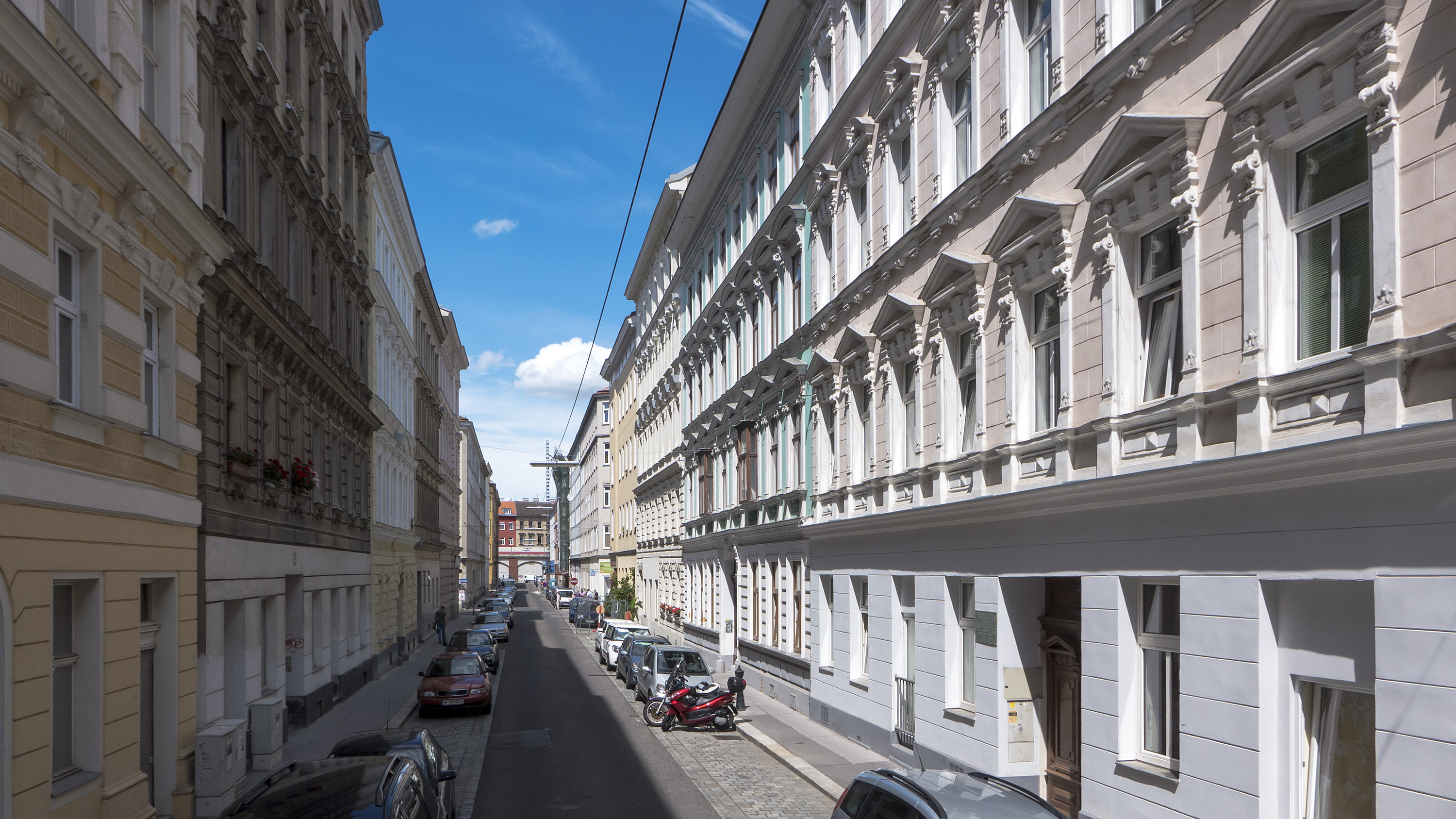 Adamsgasse in Wien 3 bei Nr. 22 Richtung Nordwesten